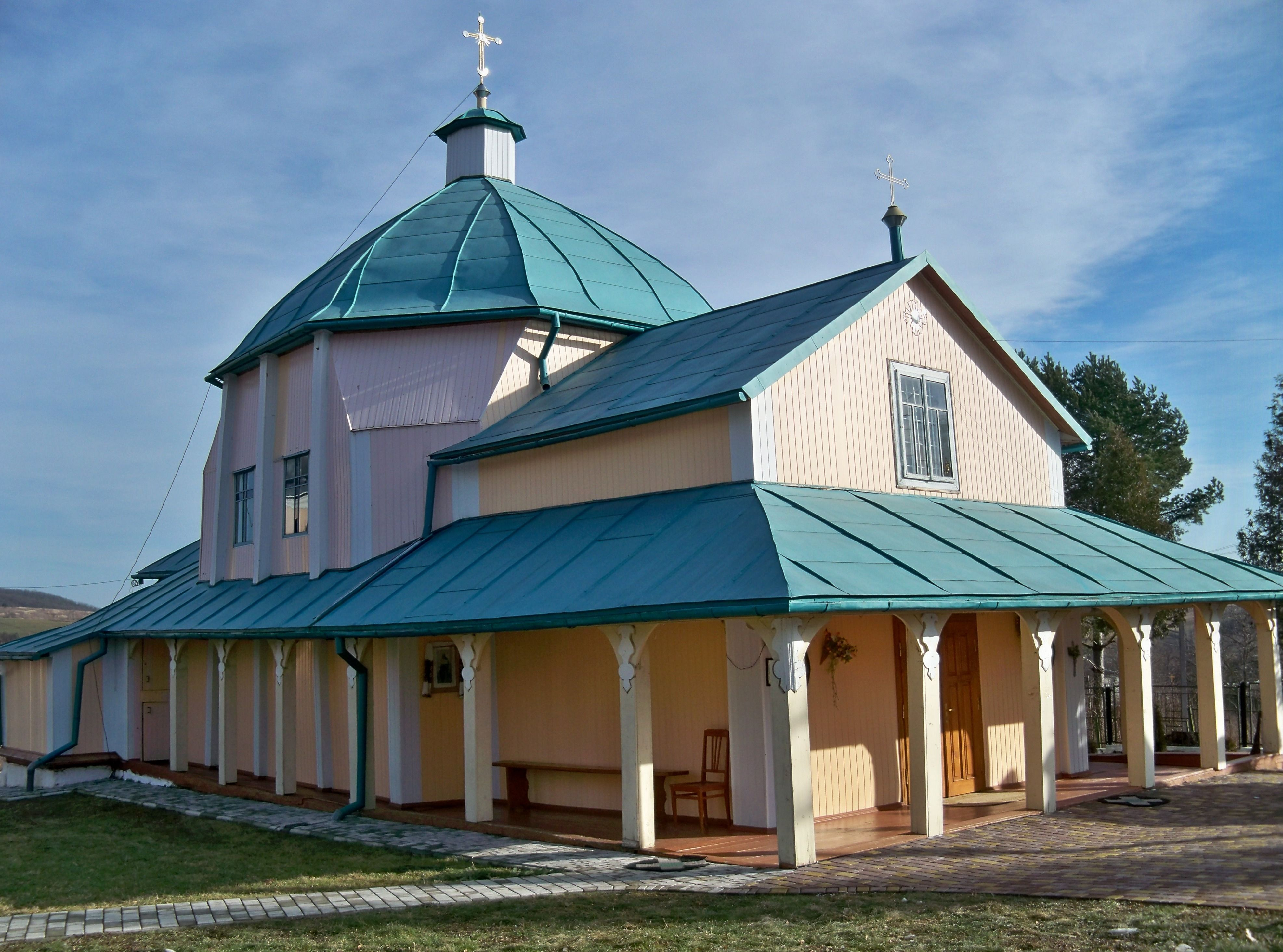 Церква Семеона Стовпника (дер.), с. Крукеничі